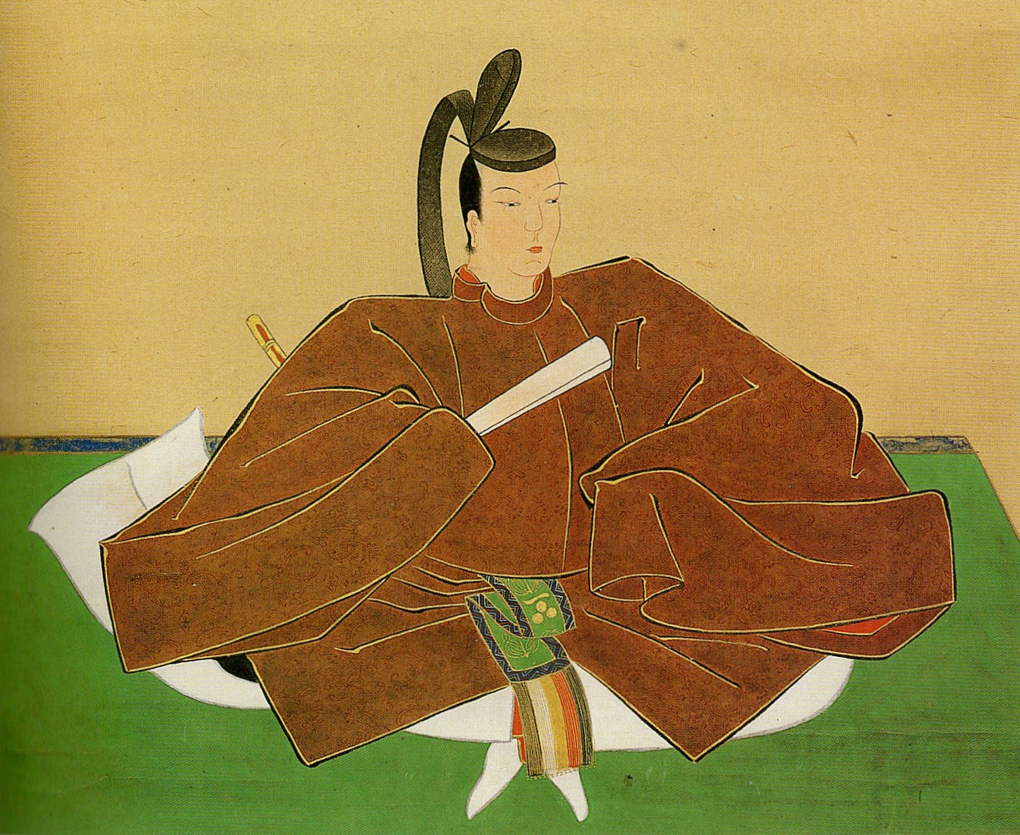 徳山藩四代藩主・毛利元堯の肖像画。